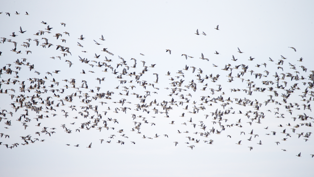 Tausende Grau-, Saat-, Bläss- und Nonnengänse südlich und westlich von Röbel/Müritz